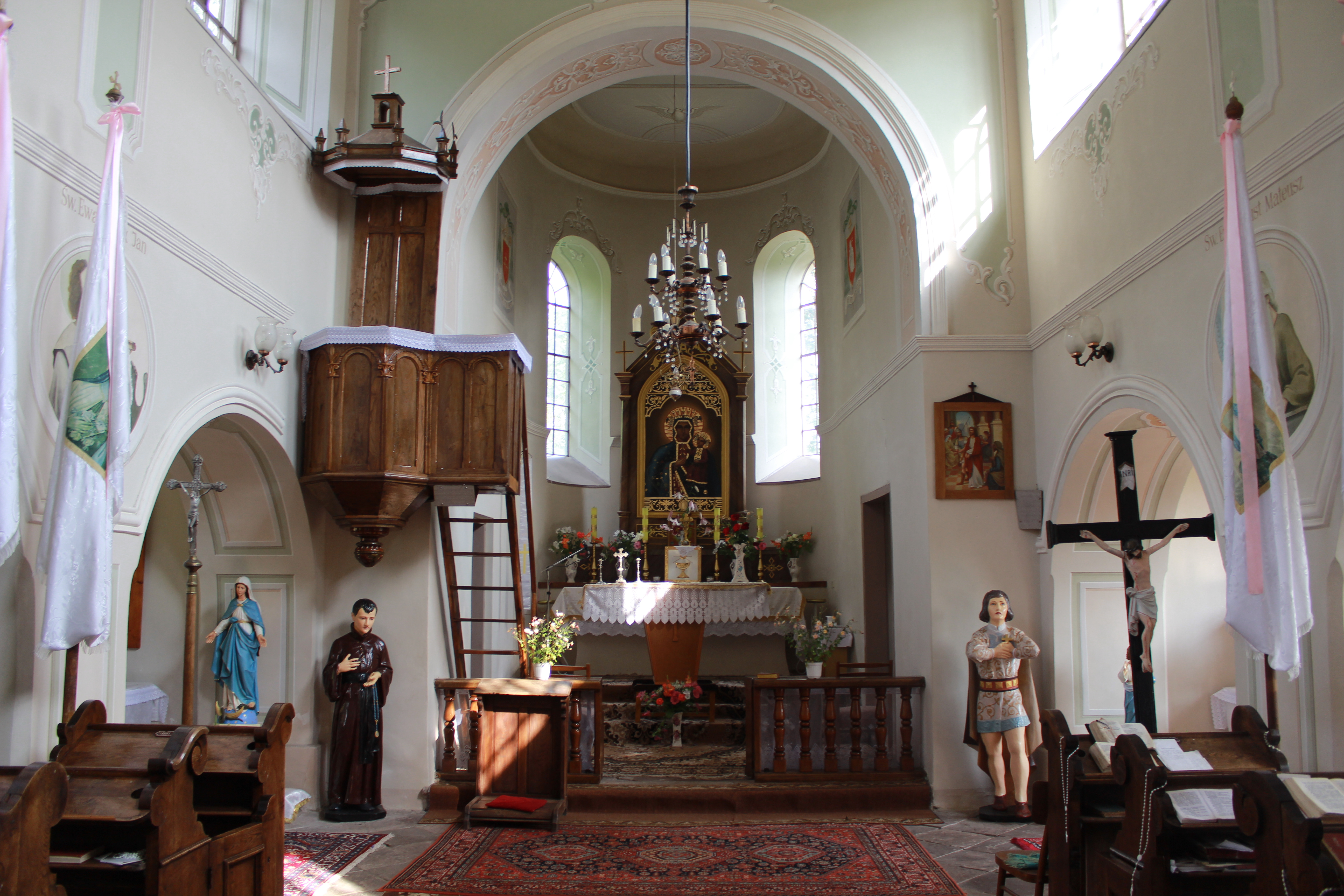 Вид в середині костелу Матері Божої Ченстоховської, с. Білий Потік, Чортківський район, Тернопільська область